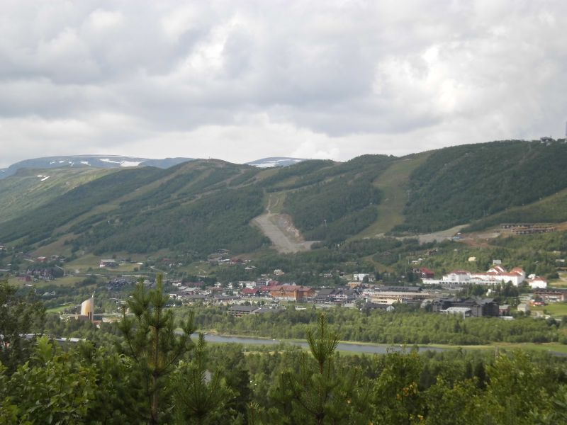 Geilo, Norwegen, Blick vom Rv40 südöstlich des Ortes auf die Stadt